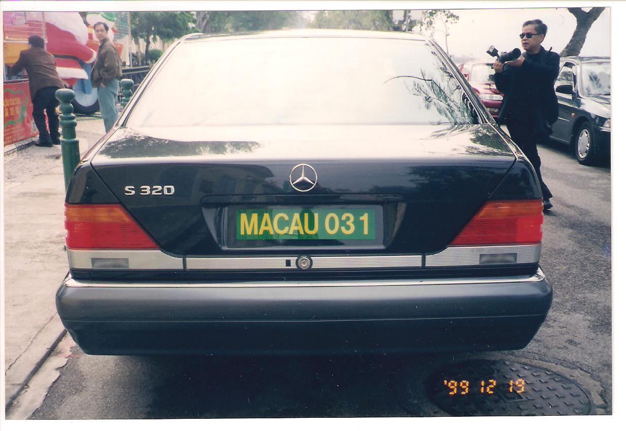 回歸時中方車牌